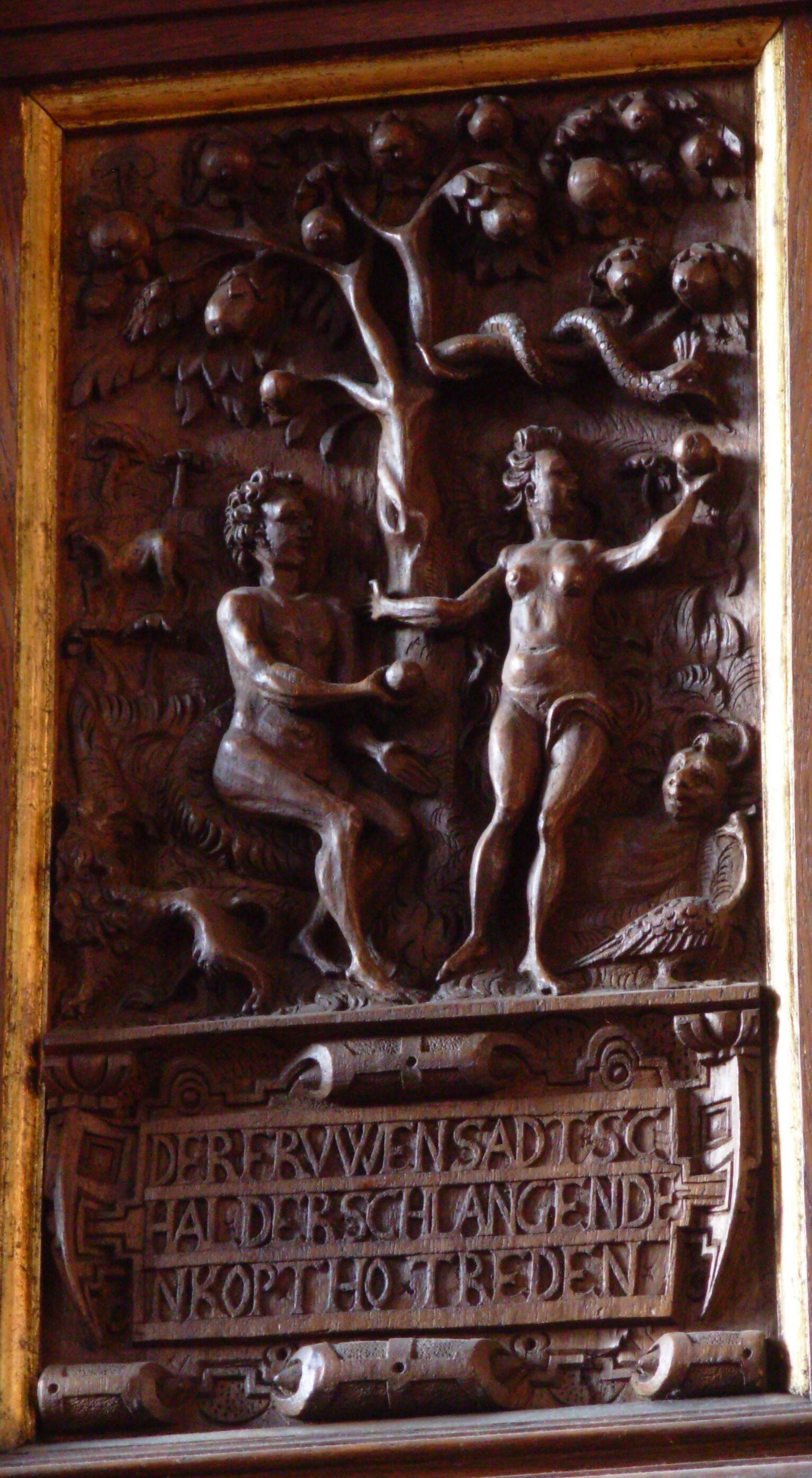 Kanzel Nikolaikirche Eckernförde, Adam und Eva